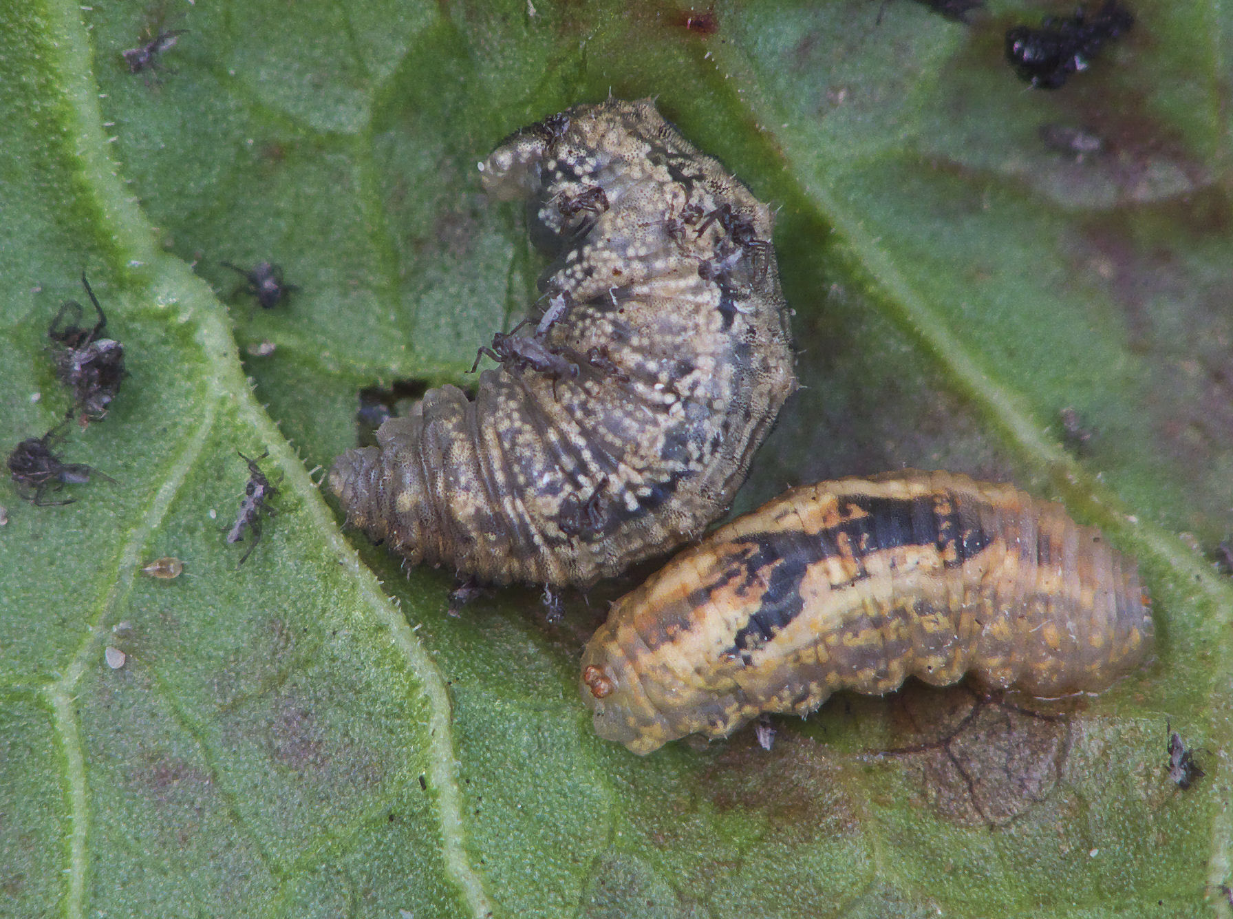 Syrphus larvae feeding on black aphids on Rumex crispus, zweefvlieg larven in een kolonoe zwarte luizen op krulzuring